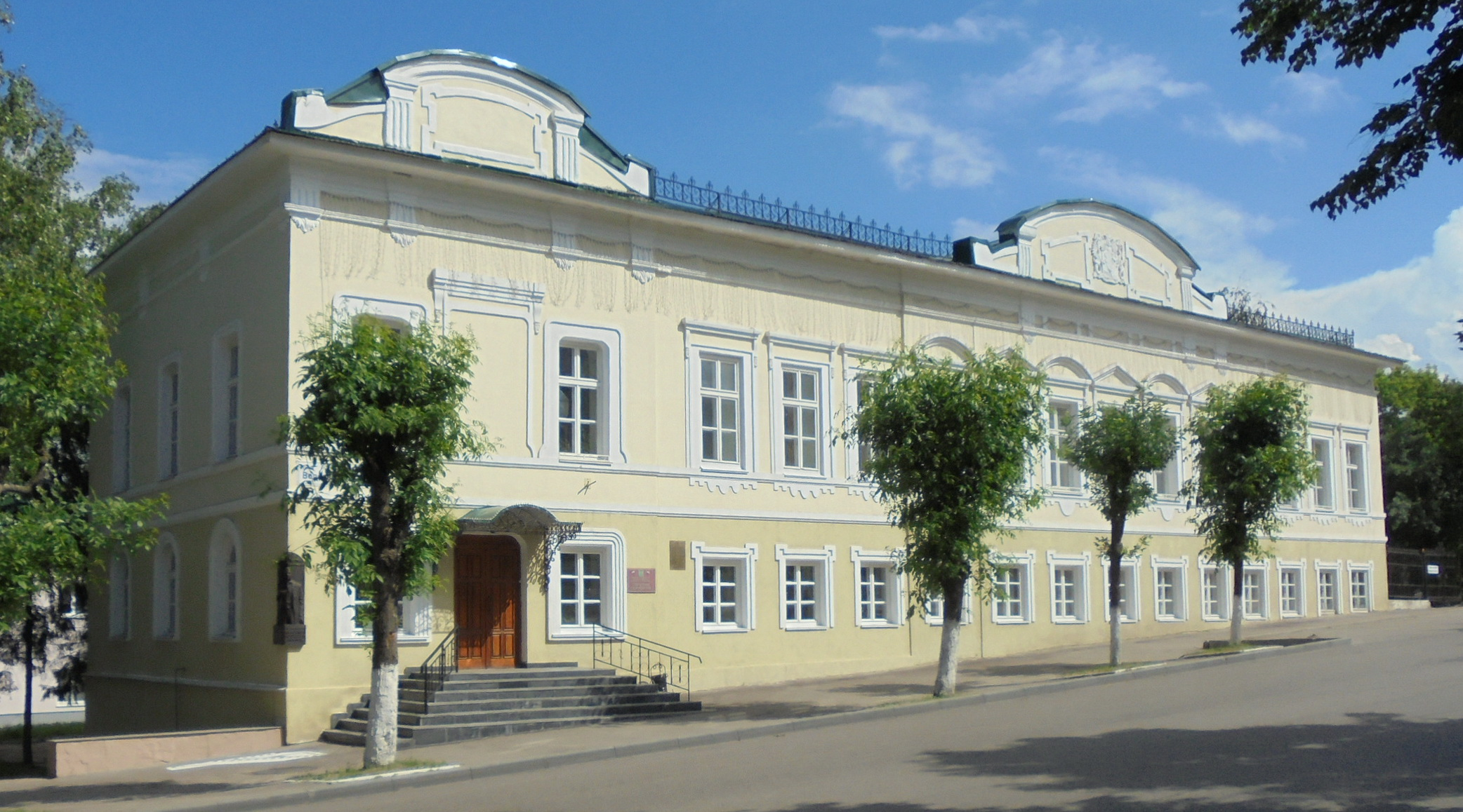 Здание 2-ой мужской гимназии, где учился большевик В.А. Карпинский и режиссер В.Э. Мейерхольд: улица Володарского, 5, Пенза, Пензенская область